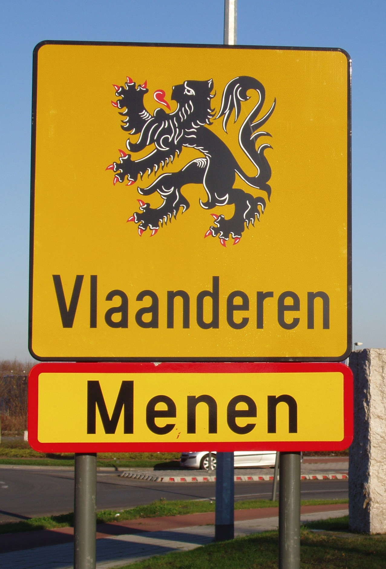 Napulitano: Borden aan de grensovergang tussen Halluin (Frankrijk) en Menen (België), tussen de N17 (Frankrijk) en de N32 (België).